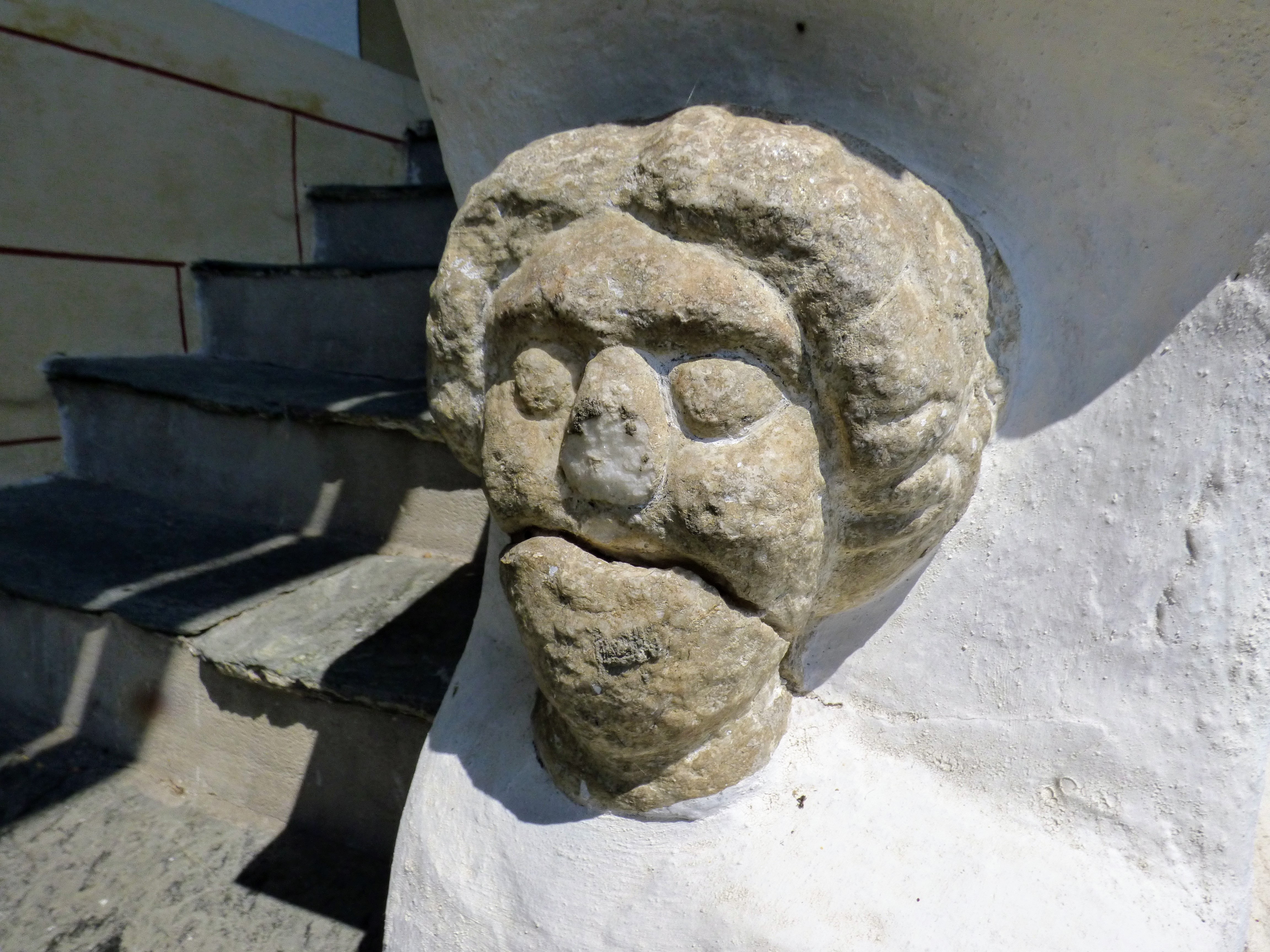 römerzeitlicher Steinkopf, eingemauert am Aufgang zum Südportal der Kath. Pfarrkirche hl. Urban, St. Urban, Kärnten